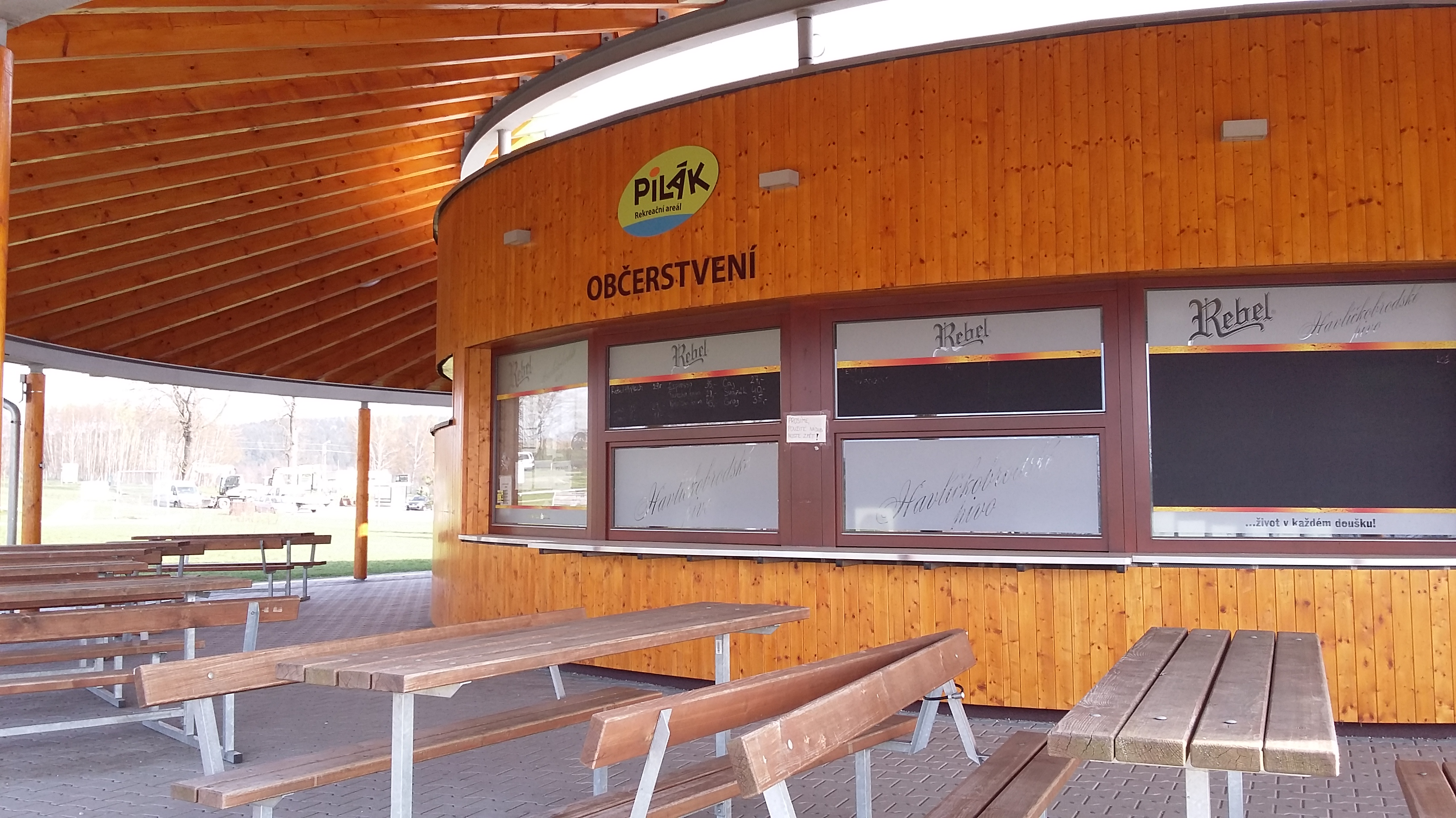 Stánek s občerstvením, rekreační areál Pilák, Pilská vodní nádrž, Žďár nad Sázavou.